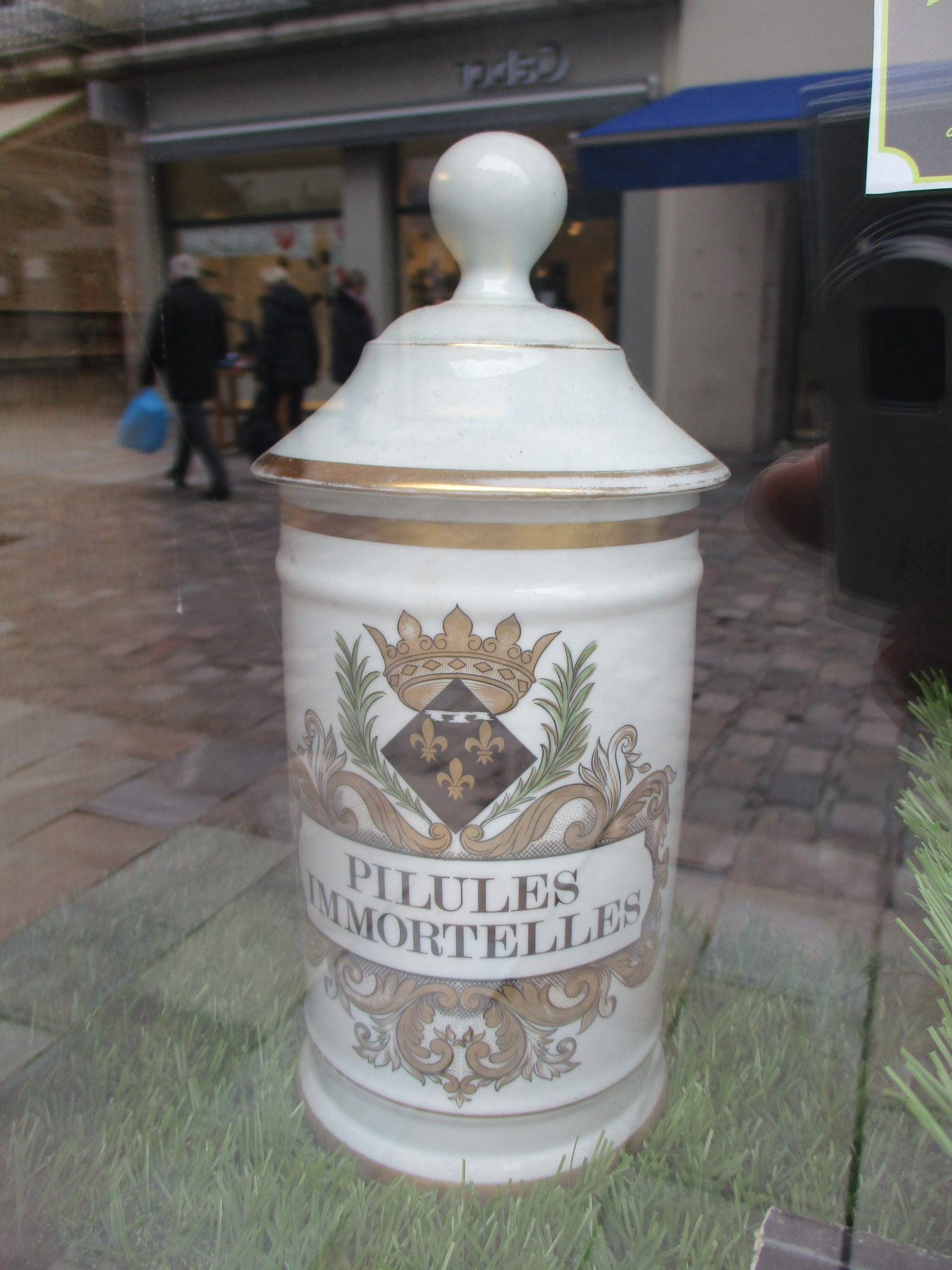 Pillules d’immortalité (pot humoristique de pharmacopée de simples médecines d'apothicaire)